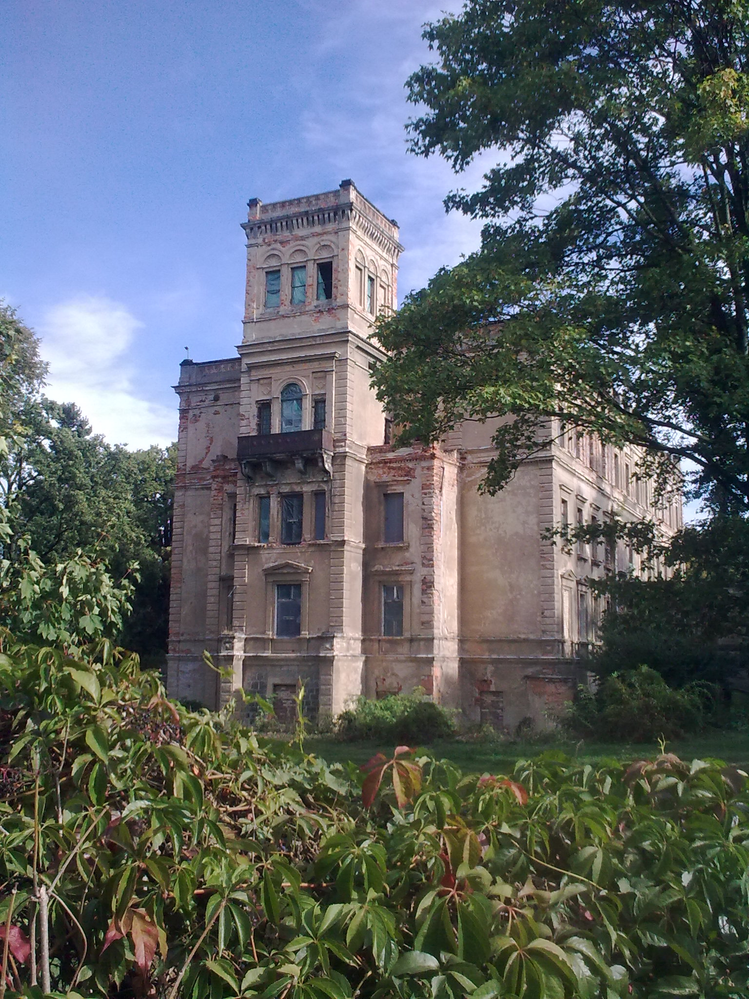 Mrowiny, ul. Zamkowa - pałac, XVII, 1870